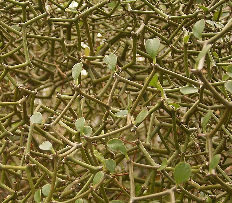 Decaria madagascariensis